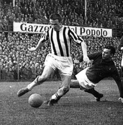 Hirzer Ferenc Gólhelyzeben